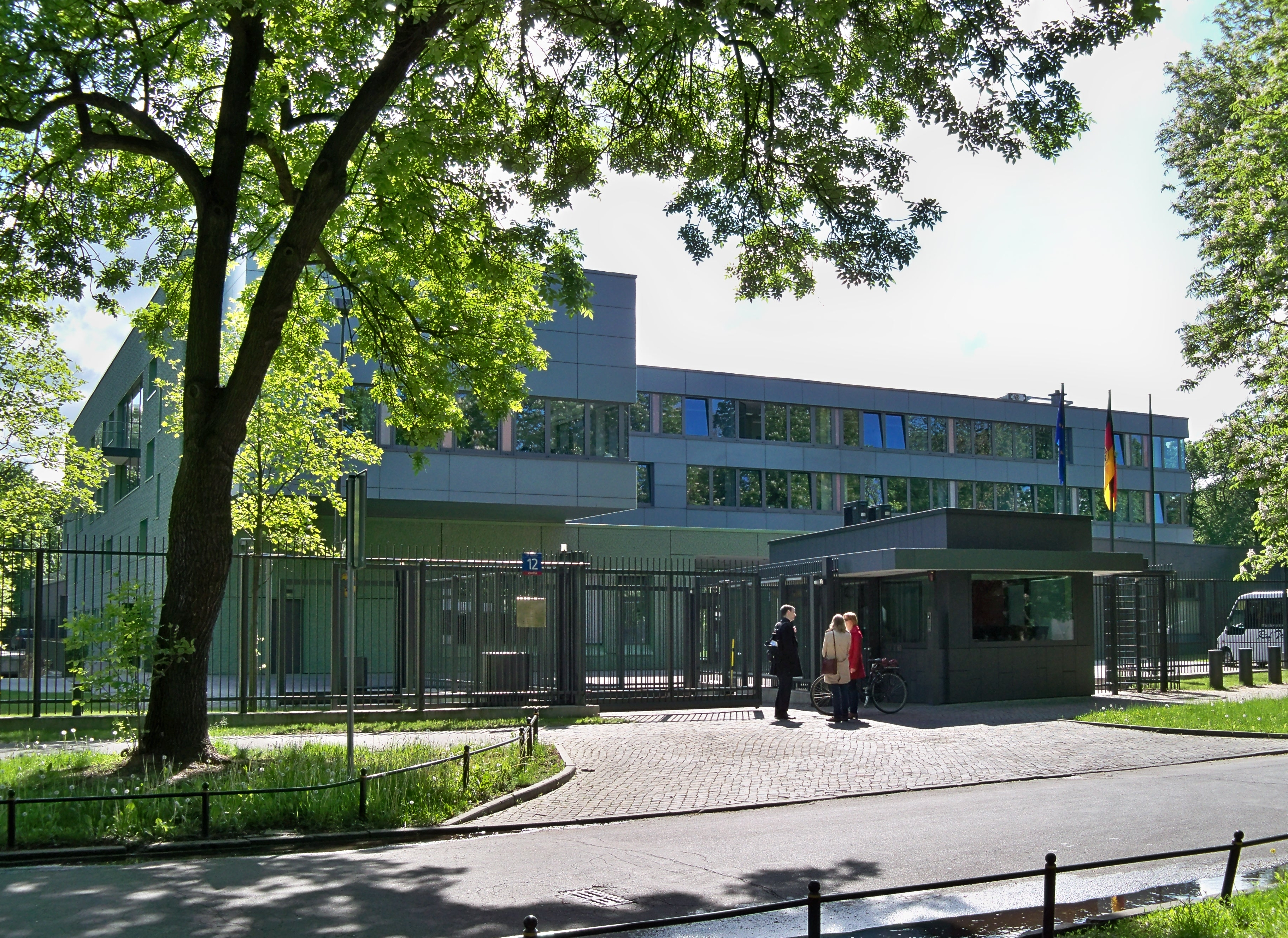 Ambasada Niemiec w Warszawie